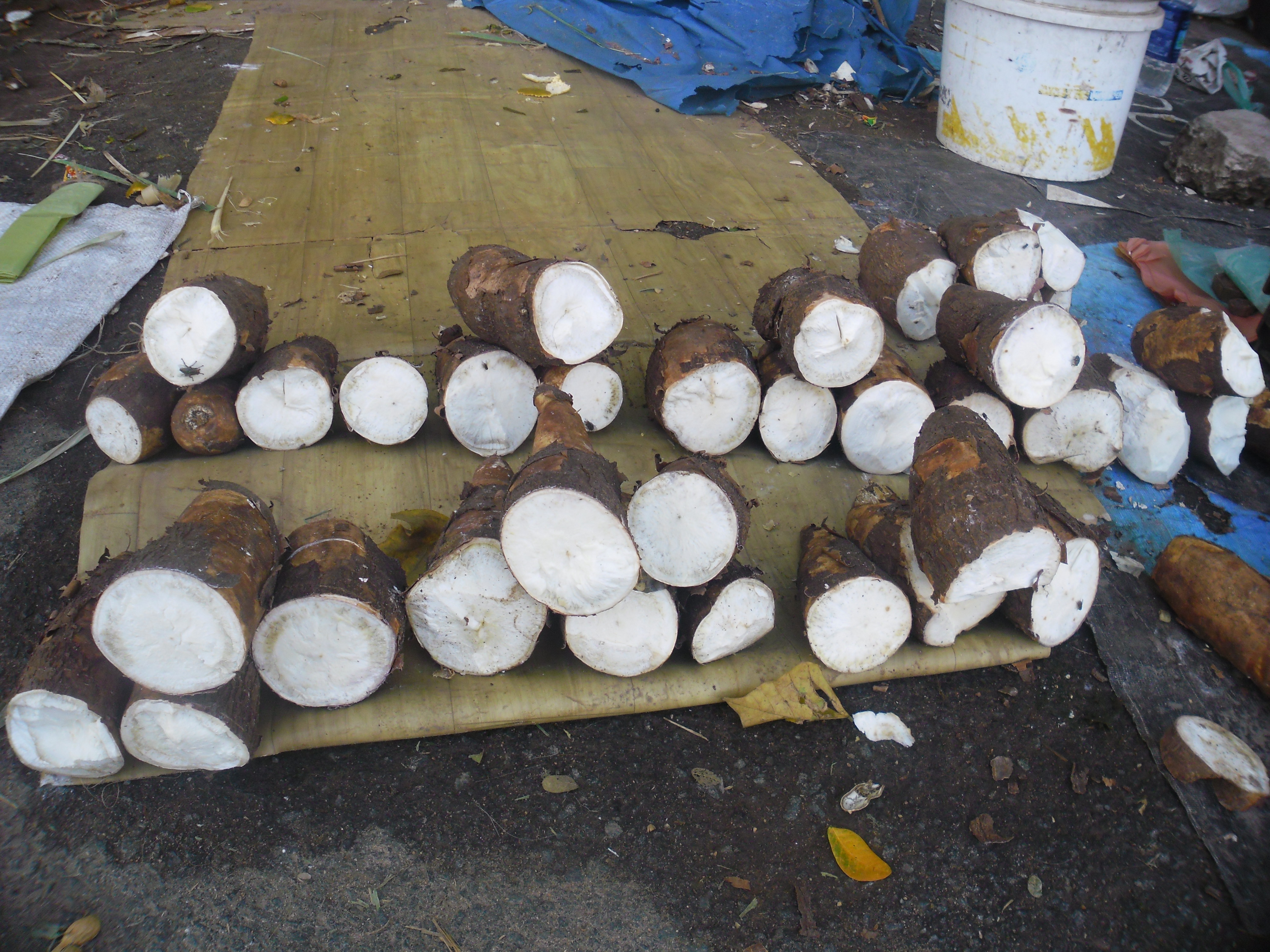 மரவள்ளிக் கிழங்கு